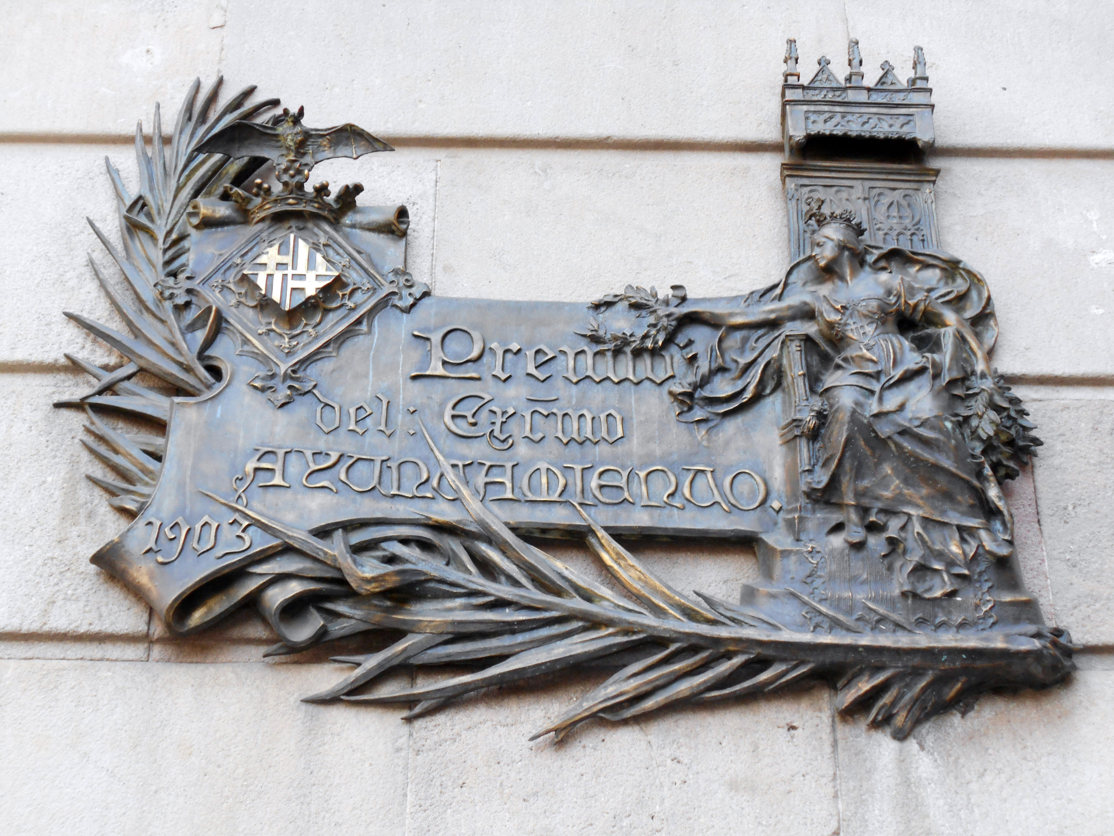 Placa del Concurso anual de edificios artísticos de Barcelona del año 1903, edificio de La Caixa de la plaza de San Jaime, obra de August Font i Carreras.